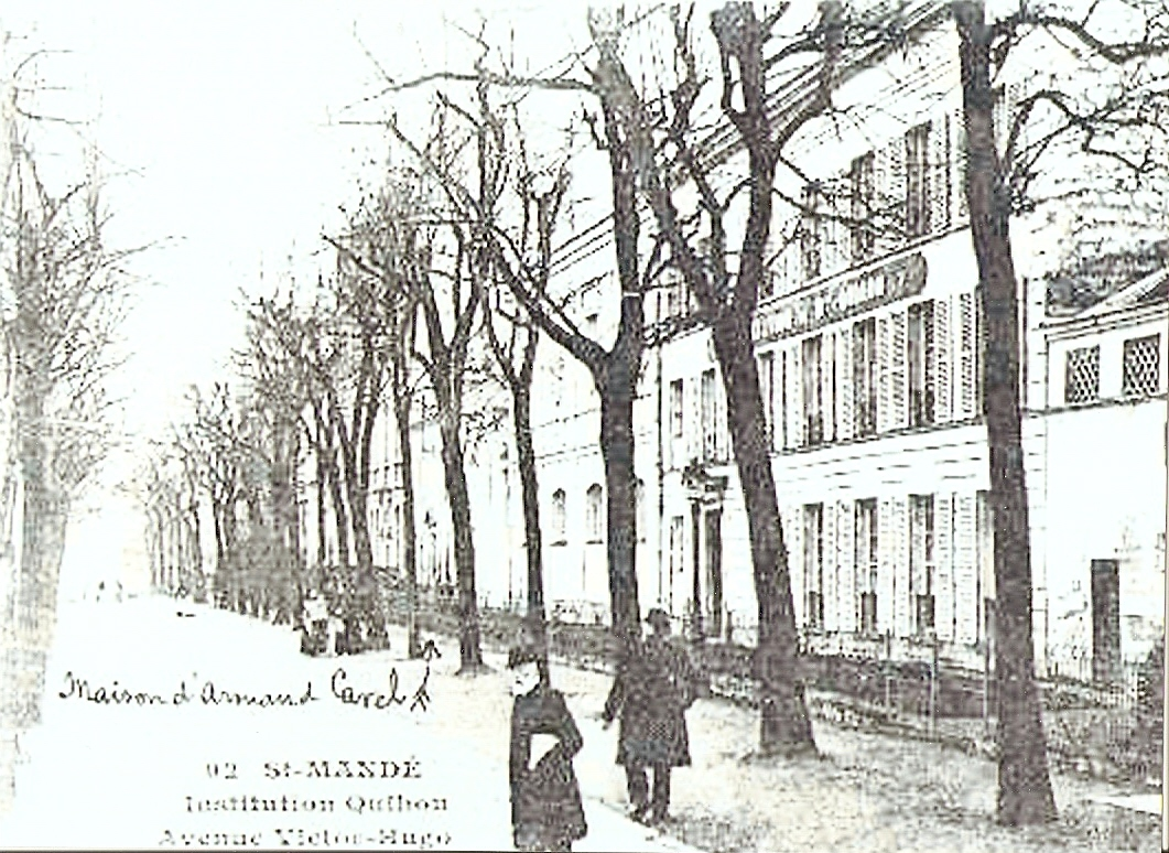 Ce cliché montre l'avenue Victor-Hugo en regardant du coté de la Mairie de Saint-Mandé. On peut voir la maison de Monsieur Peyrat ou Armand Carrel est mort à la suite d'un duel et le plus à droite l'ancien pensionnat des Chanoinesses de Saint Augustin qui a accueillit Juliette Drouet la maîtresse de Victor Hugo et qui lui a servi de référence livresque dans les Misérables.